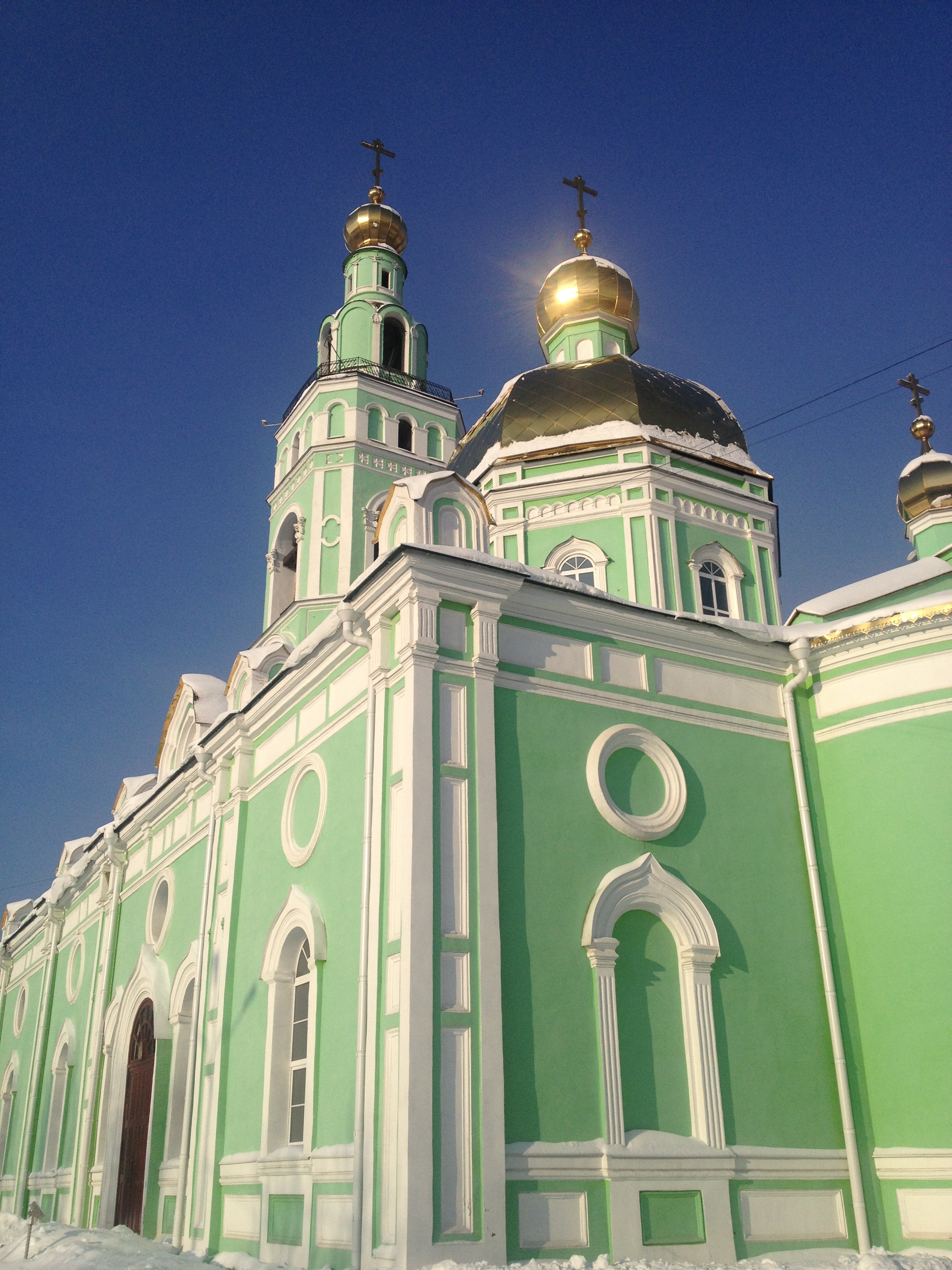 Церковь Свято-Троицкая: улица Трудовая, 3, Нижний Тагил, Свердловская область